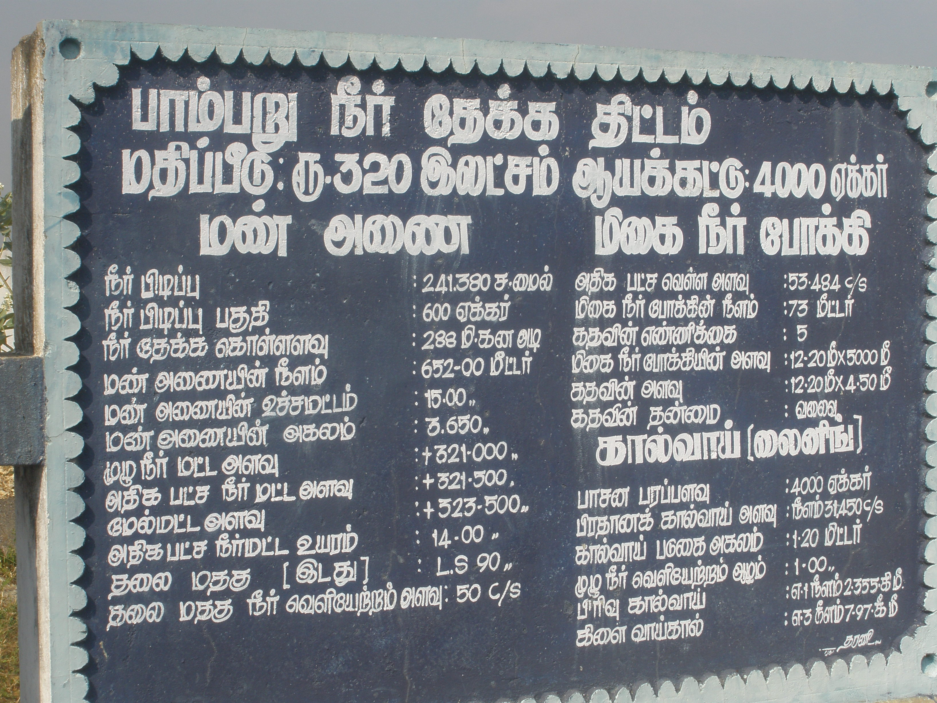 Pambar Dam